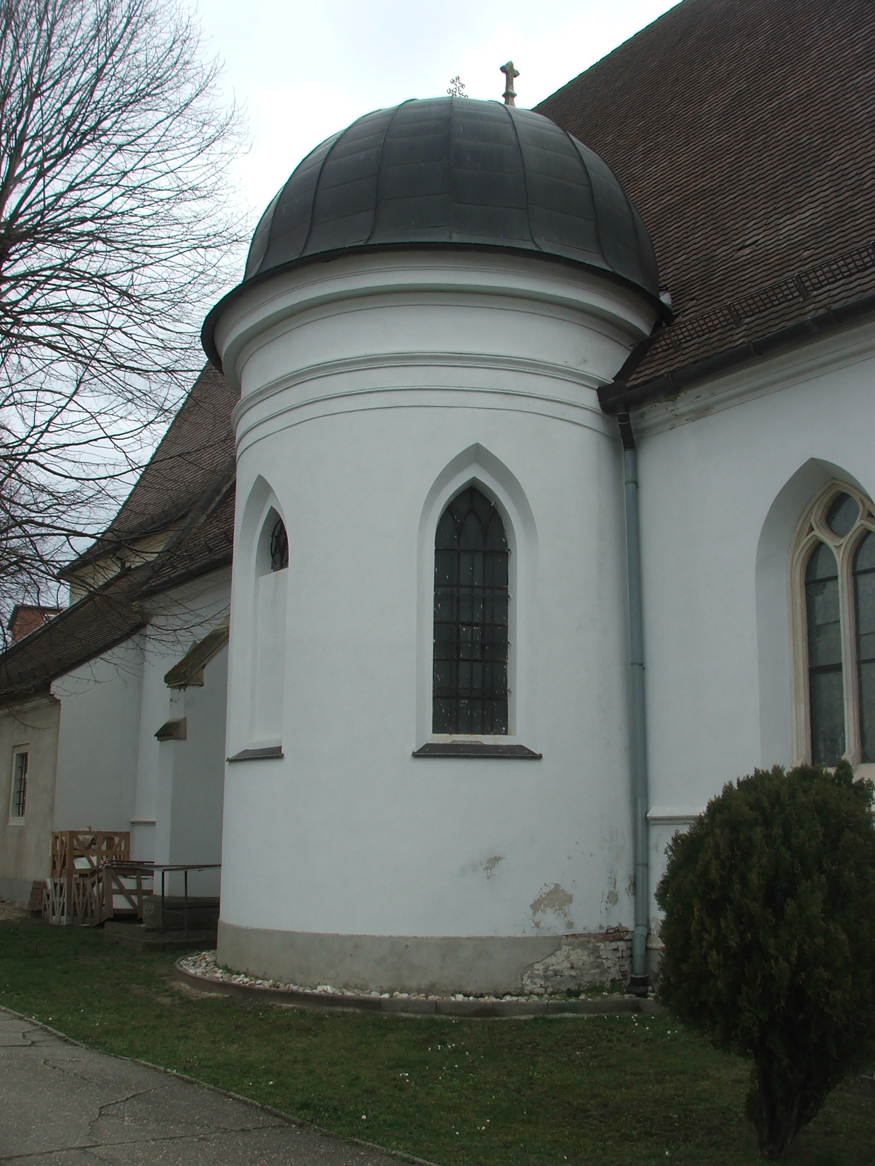 Pezinok-Kostol Nanebovzatej Panny Márie